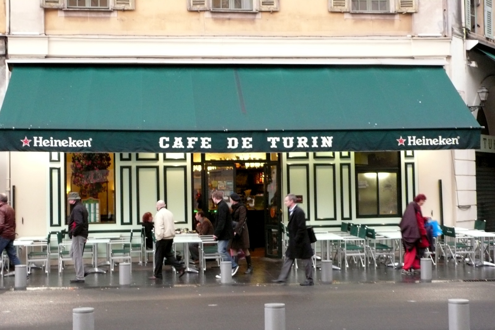 Le Café de Turin (côté boulevard Jean-Jaurès) à Nice (Alpes-Maritimes, France).